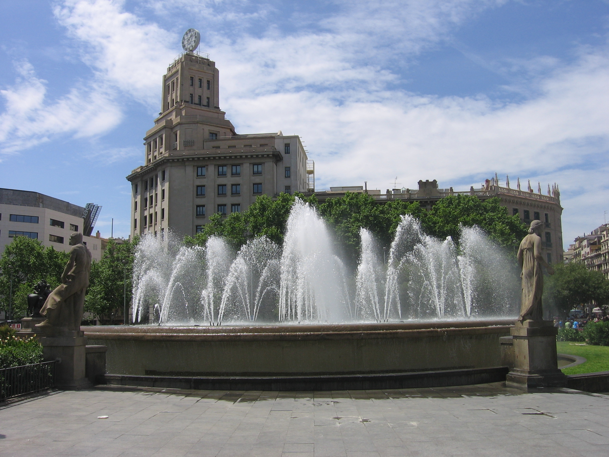 Fuente de la Plaza de Cataluña (Barcelona).